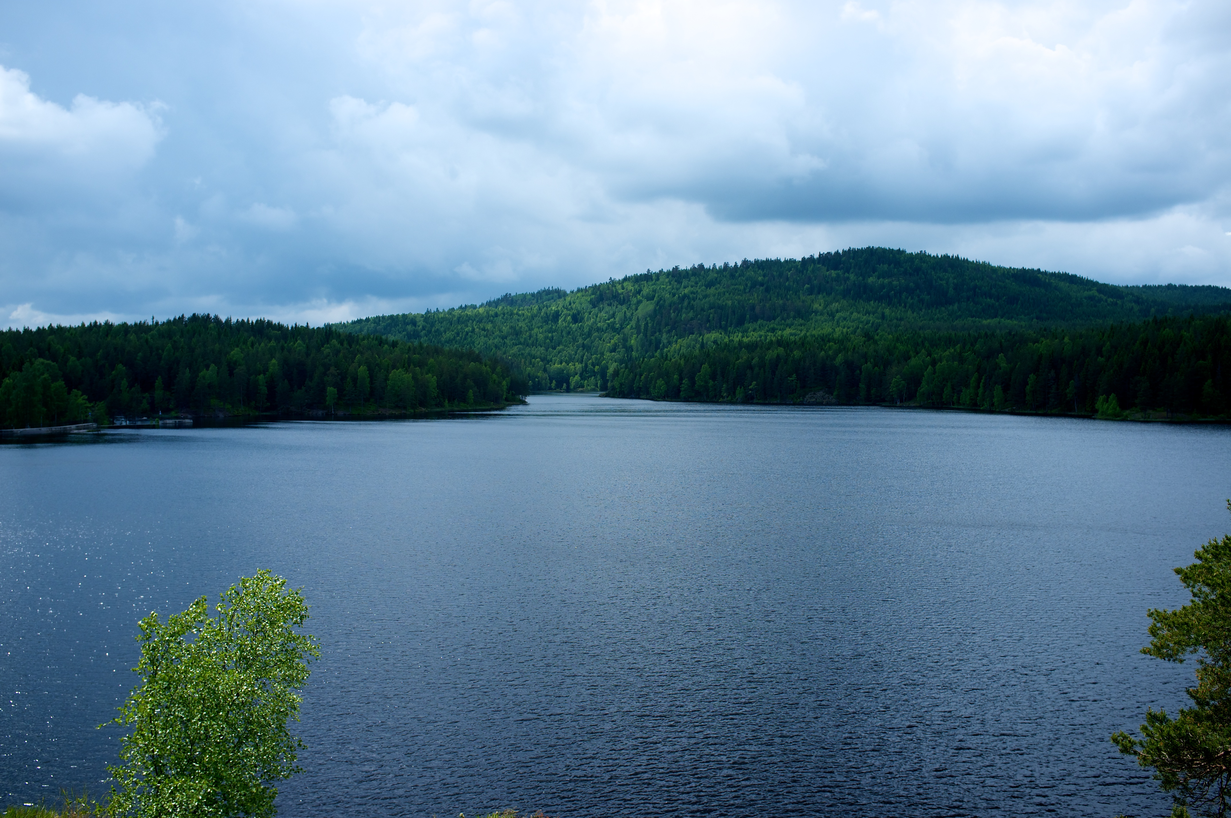 Østernvann i Bærum